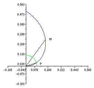 Spirale d'Archimède et trisection de l'angle - Image personnelle - licence